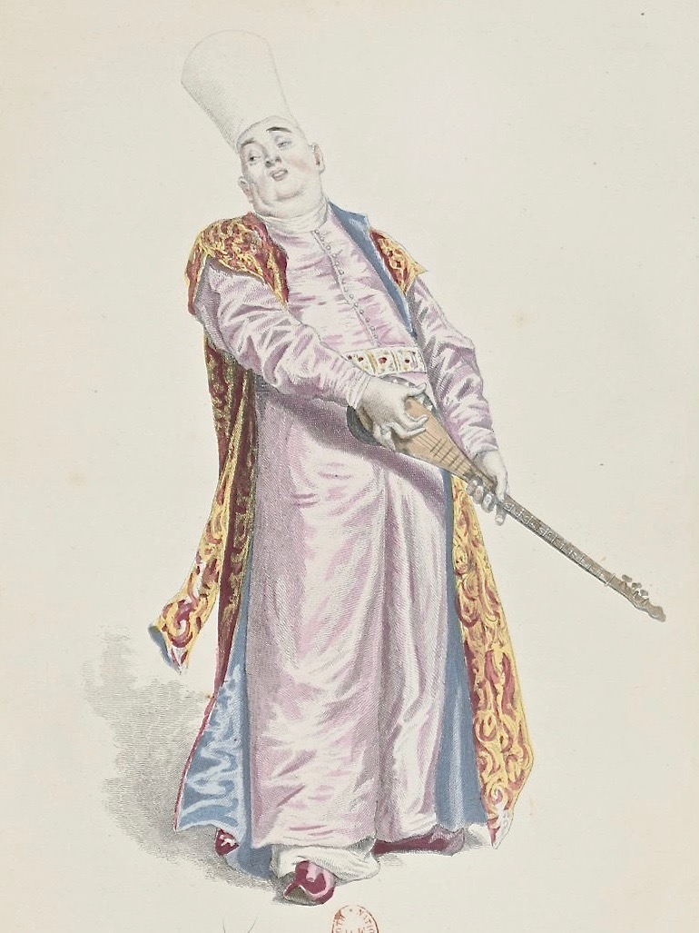 Émile Bayard (1837–1891): Calpigi. Illustration zu Pierre-Augustin Caron de Beaumarchais (1732–1799), Antonio Salieri (1750–1825): Tarare (1787). Aus: Oeuvres complètes de Beaumarchais, hrsg. v. Édouard Fournier, Paris 1876, S. 212/213. Bibliothèque nationale de France.